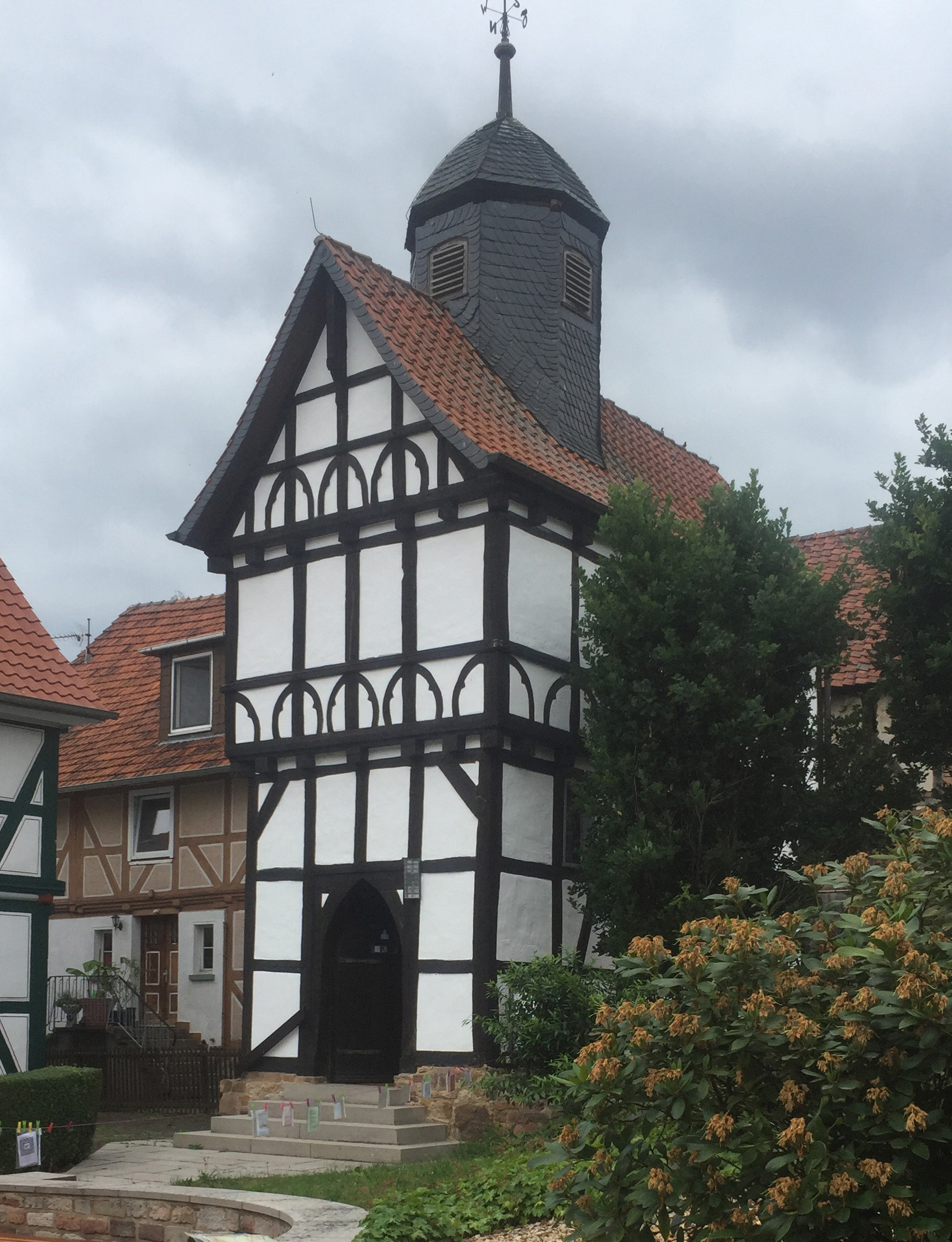 Gotische Kapelle in Wagenfurth (Körle) - Spätmittelalterlicher Ständerbau aus dem 15. Jahrhundert mit Bezügen zur Gotik.